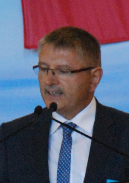 Charles Juillard, président du Conseil d'État jurassien, au Marché-concours de Saignelégier (2016).